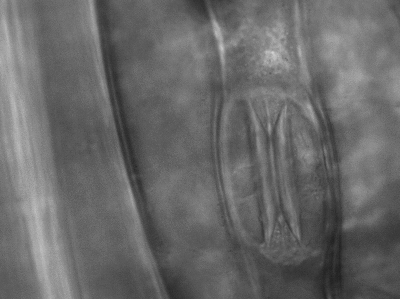 Een huidmondje op het oppervlak van gras - zelf gemaakt